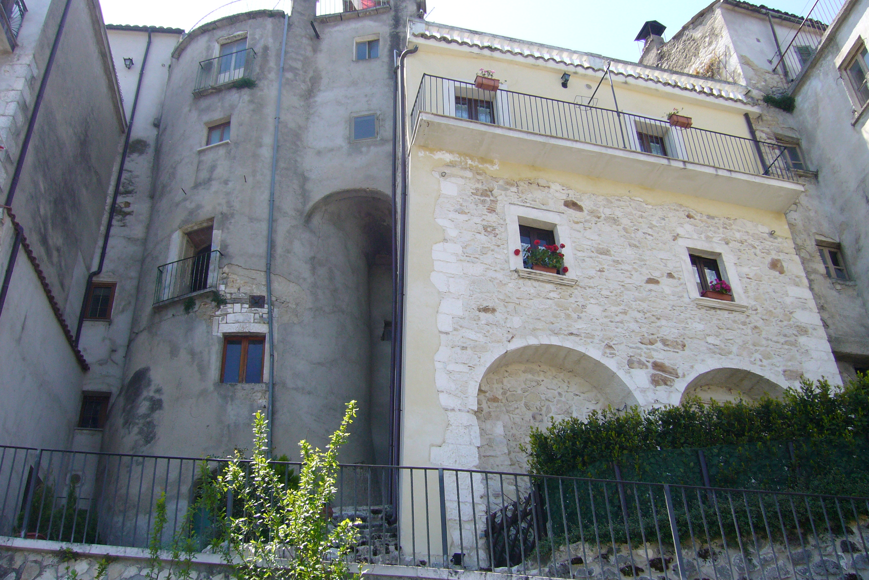 Case tipiche di Pretoro